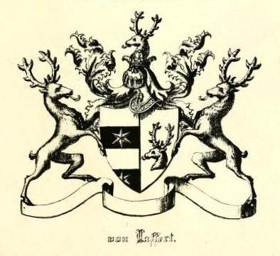 Wappen derer von Laffert, mit zwei Hirschen als Schildhaltern, auch geführt von den von Laffert-von Kobylinski auf Dannenbüttel, die kognatisch vom Haus Laffert-Dannenbüttel abstammen